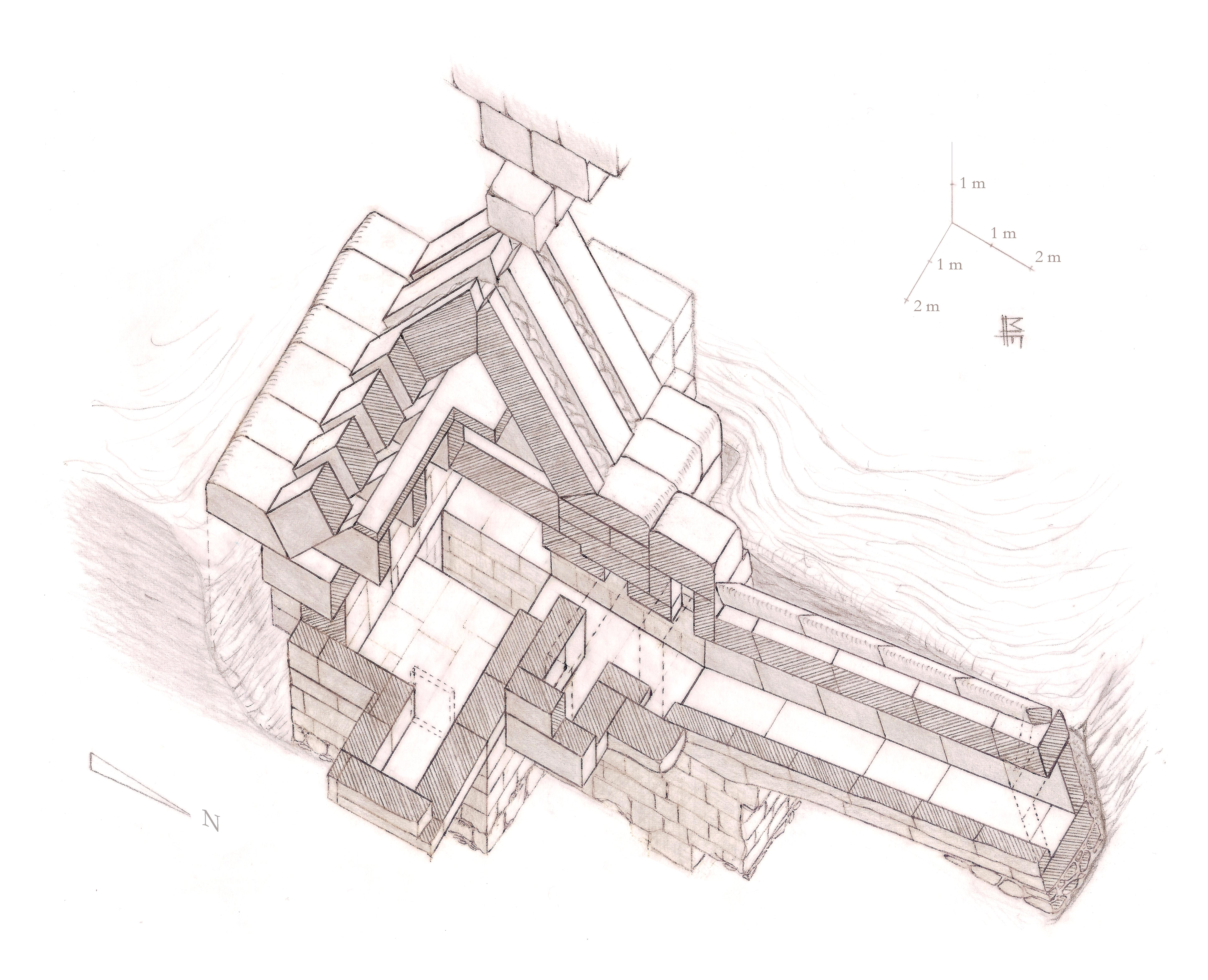 Vue des appartements funéraires de la pyramide d'amenemhat II à Dahchour, niveau 1 et système de couverture